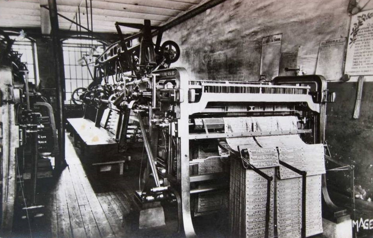 Un métier à dentelle avec son Jacquard, Caudry, Nord, Nord-Pas-de-Calais, France.